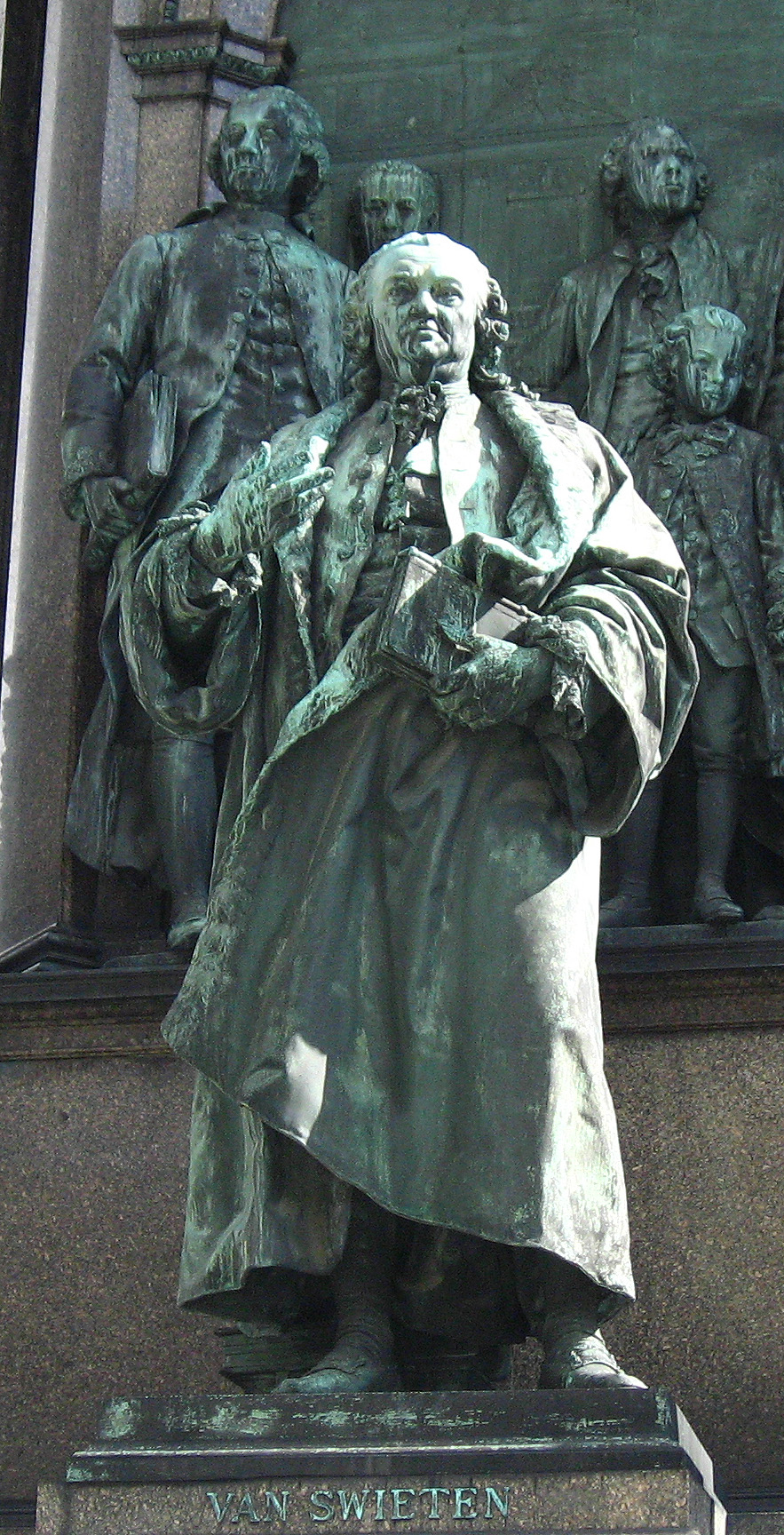 Gerard van Swieten am Maria Theresien Denkmal beim Kunsthistorischen Museum in Wien, rechts hinten der junge Wolfgang Amadeus Mozart